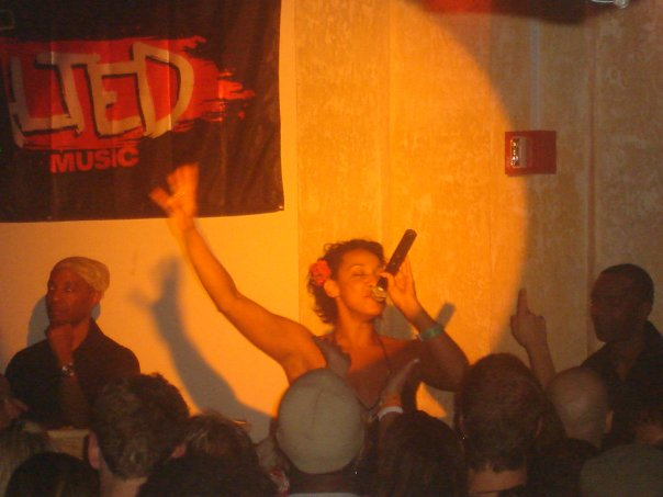 Lisa Shaw @ Live